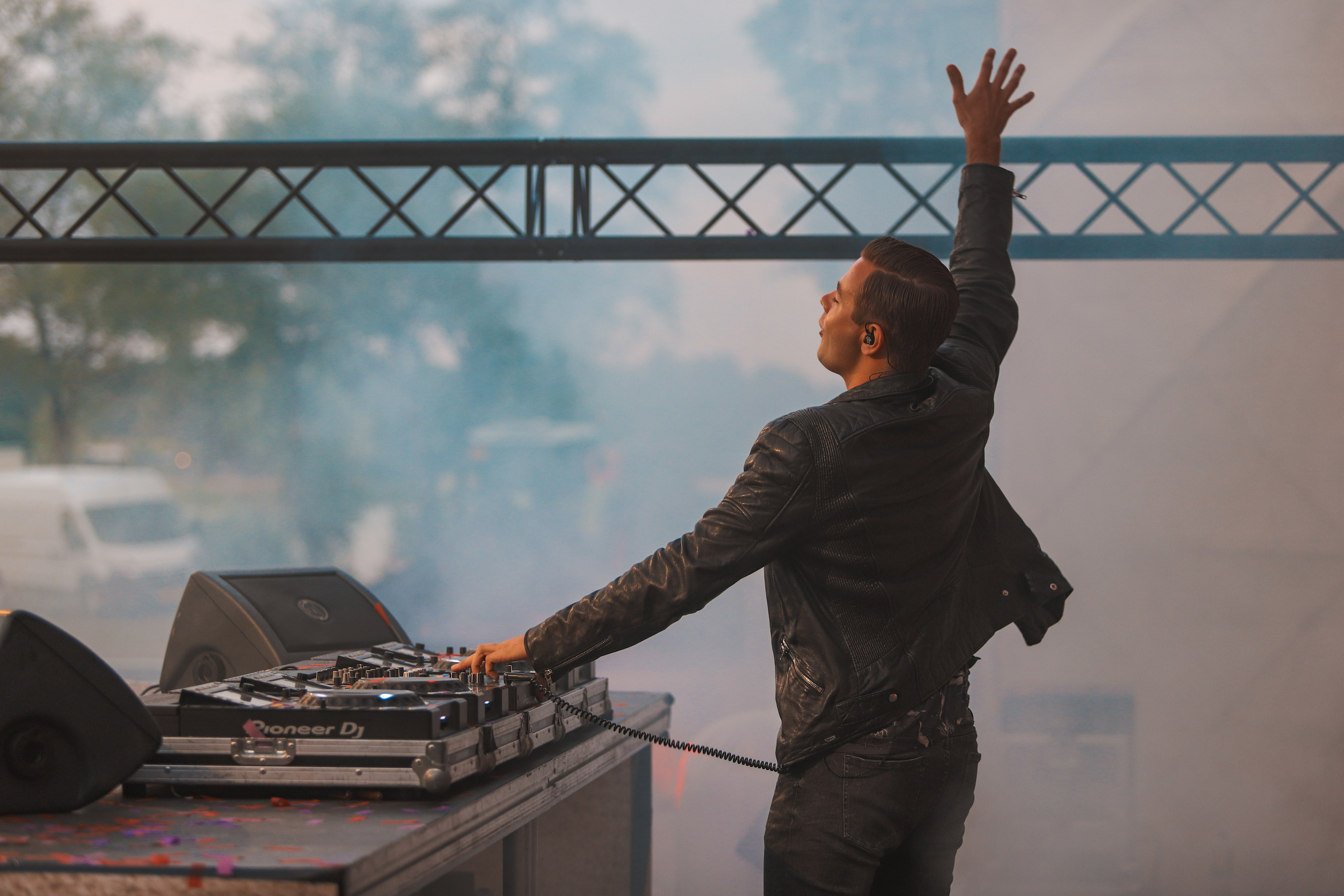 Sam Feldt tijdens een optreden in 2019